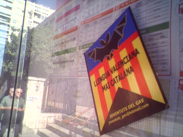 Adhesiu del GAV (Grup d'Accio [sic] Valencianista en una parada d'autobús. Fotografia presa al costat de l'Escola Universitària de Magisteri "Ausiàs March" (València, Espanya).